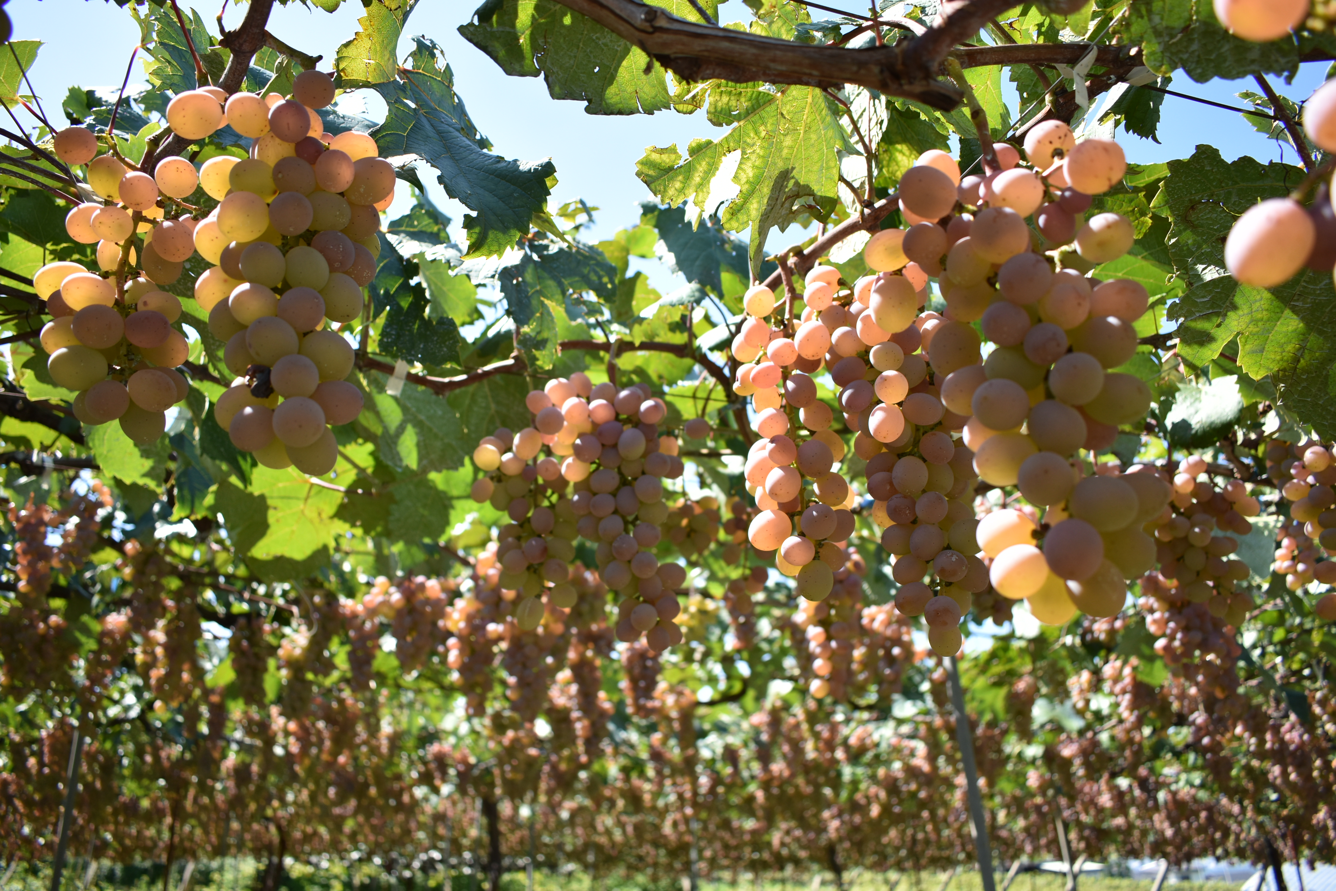 丸藤葡萄酒工業